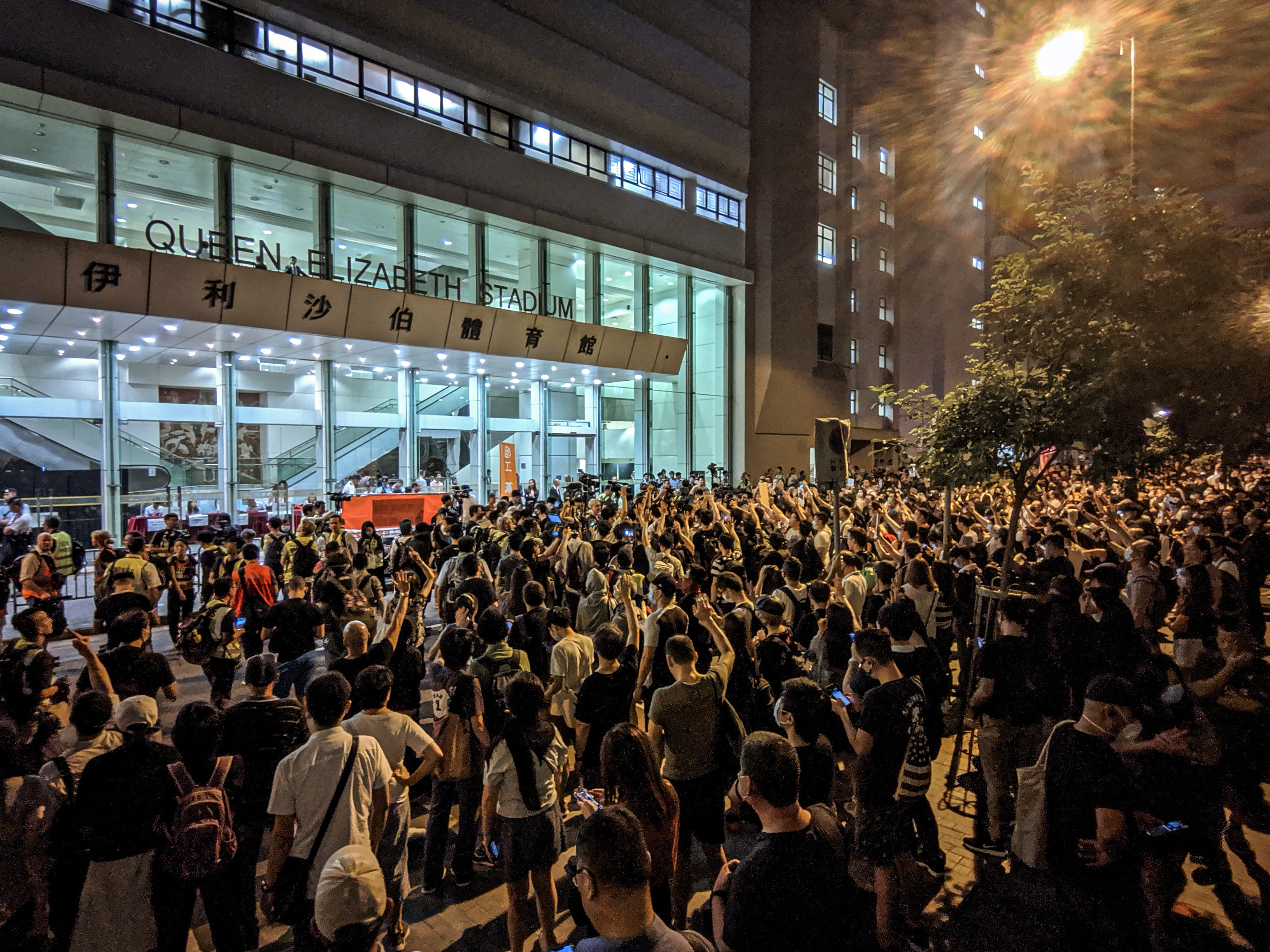 20190926 Wan Chai